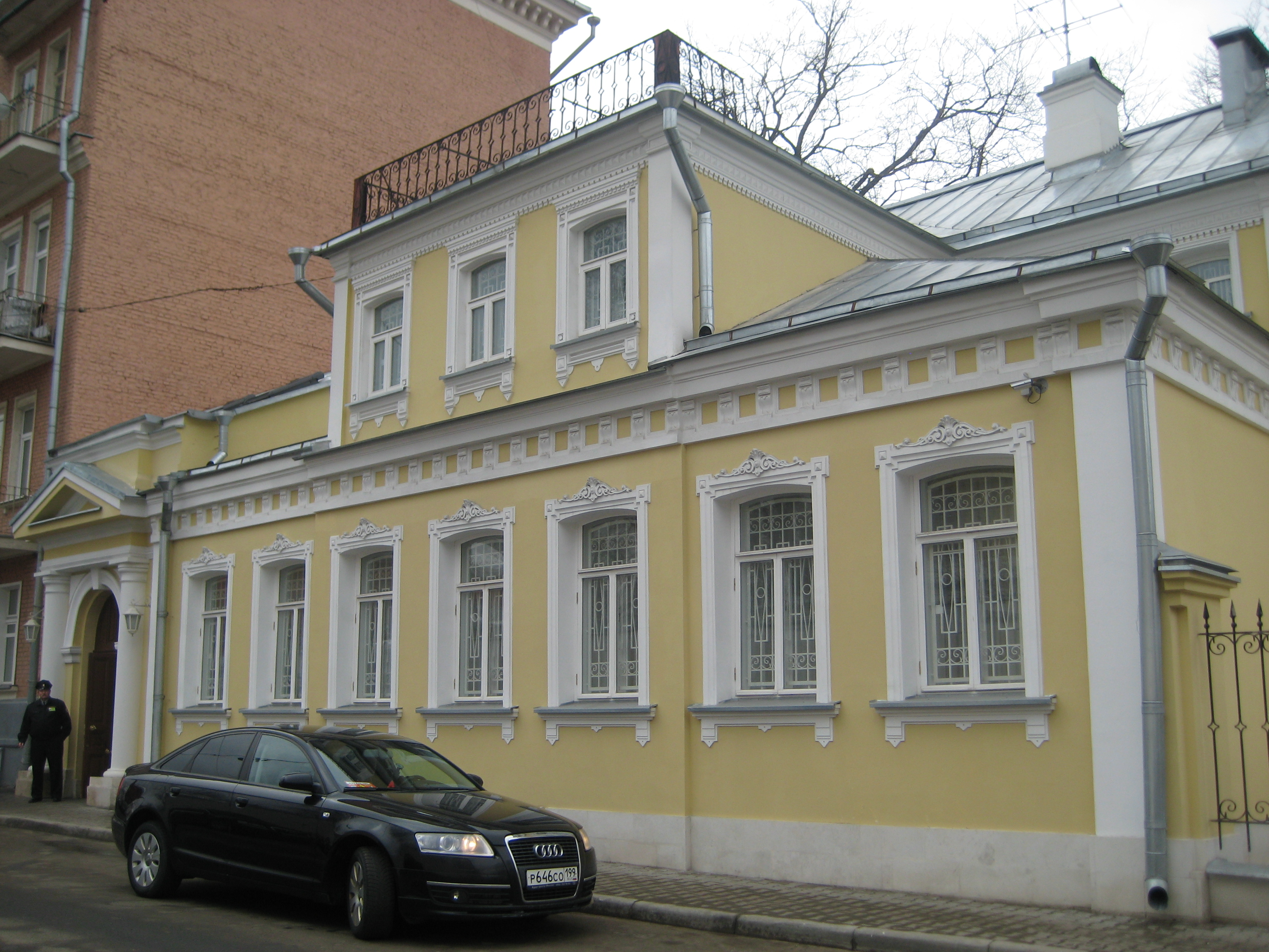 Фасад музея Тропинина